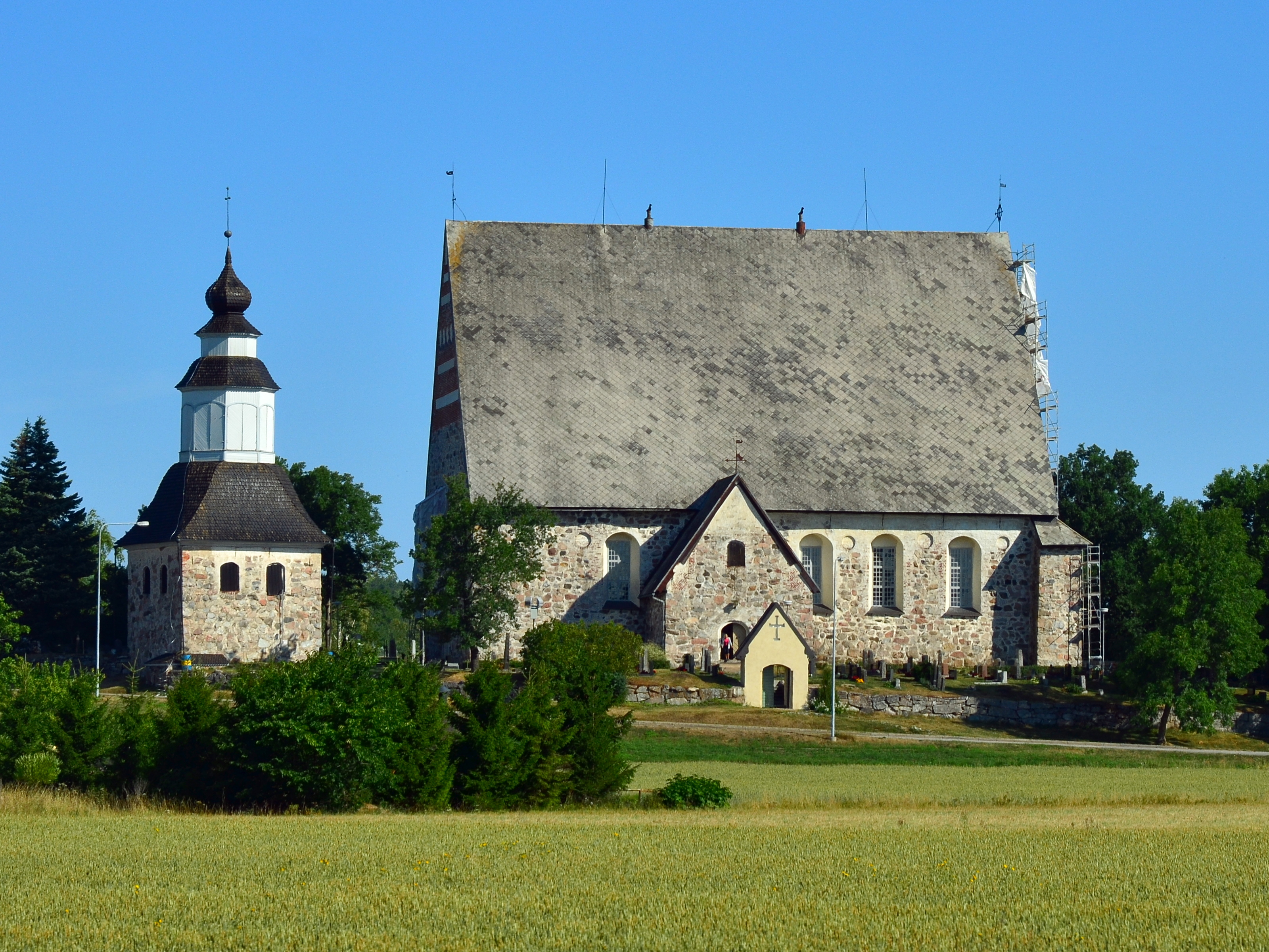 Kyrkan i Sagu, Finland.